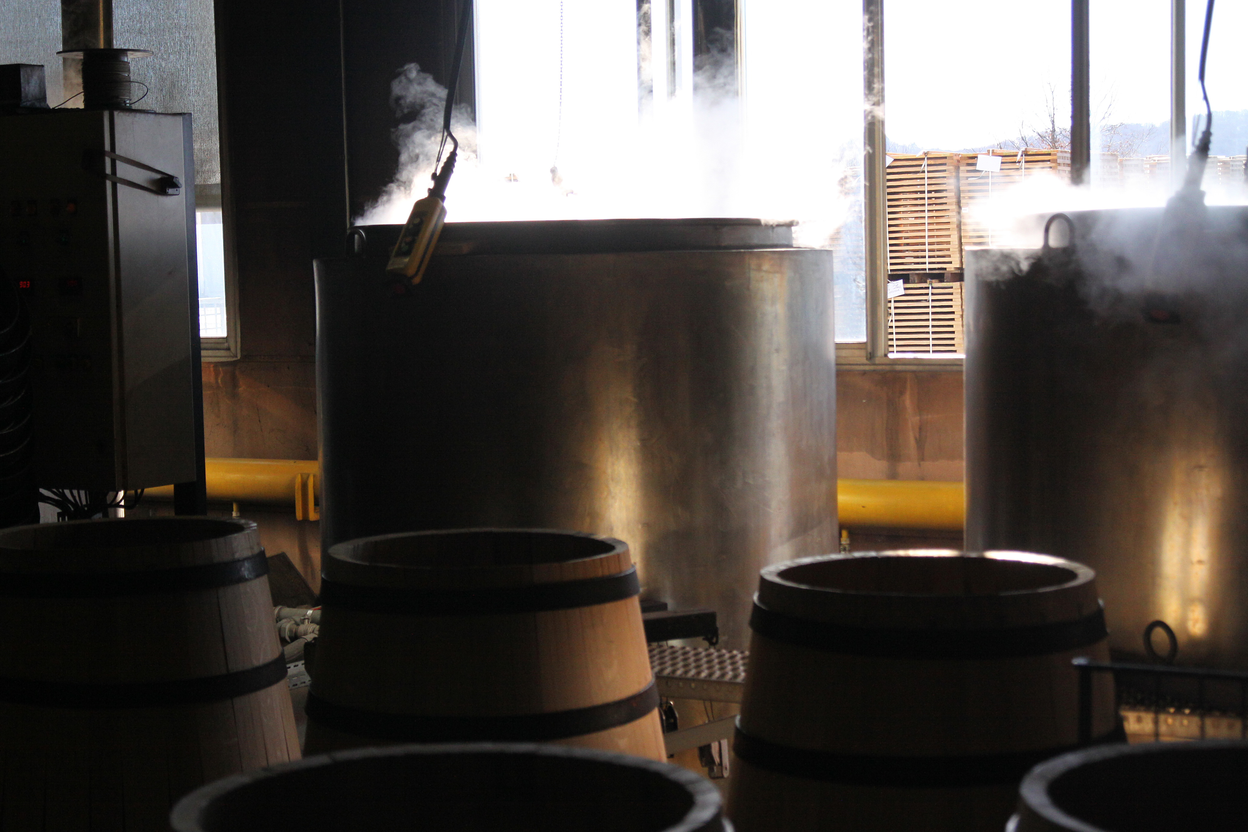 Cintrage des fûts par immersion dans la vapeur d'eau